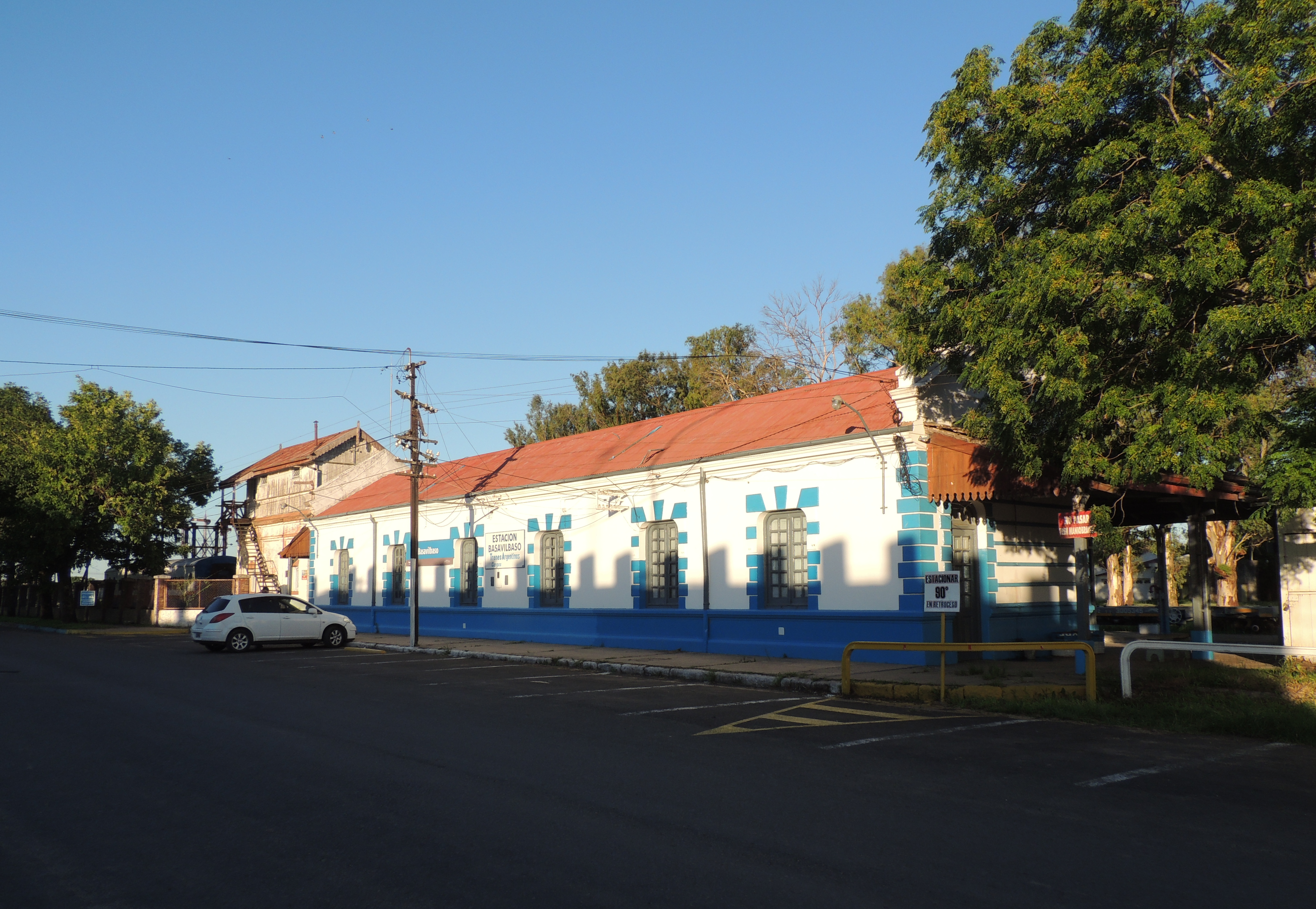 Frente de la Estación Basavilbaso, en la localidad homónima del departamento Uruguay, provincia de Entre Ríos, Argentina